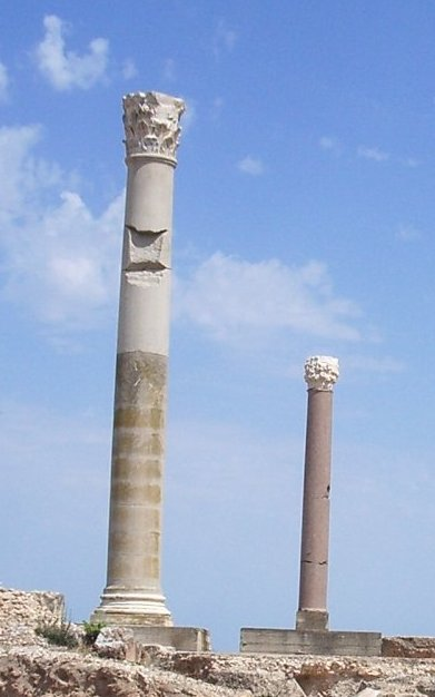 Columnes a les termes d'Antoní